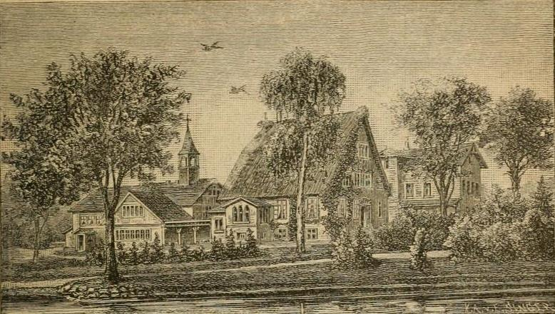 Das benachbarte Gebäude mit Dachreiter ist der Betsaal